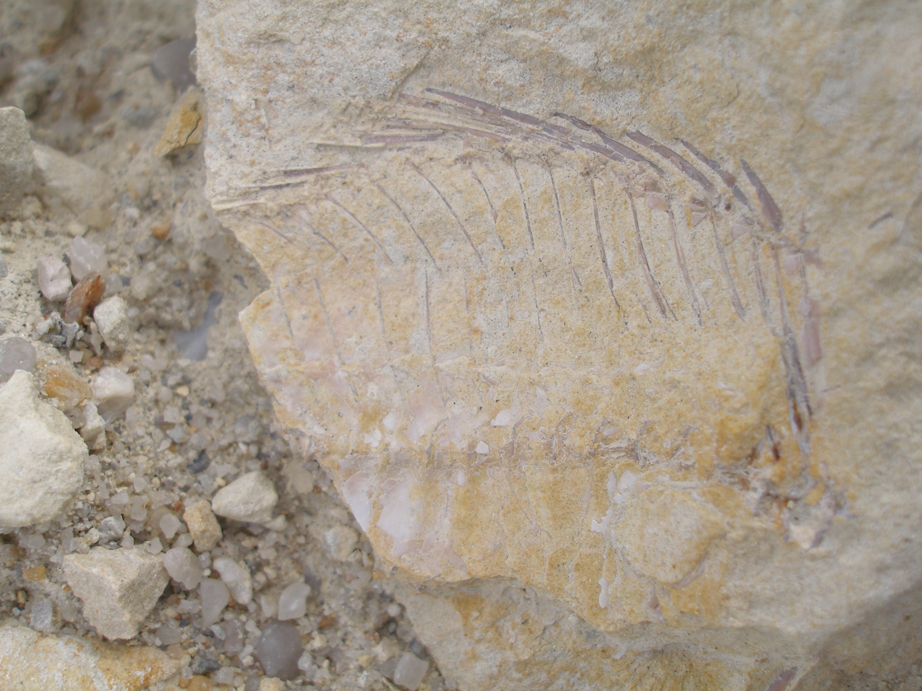 Zkamenělina okounovité ryby nalezená v lupkových dolech u Nového Strašecí, Česko